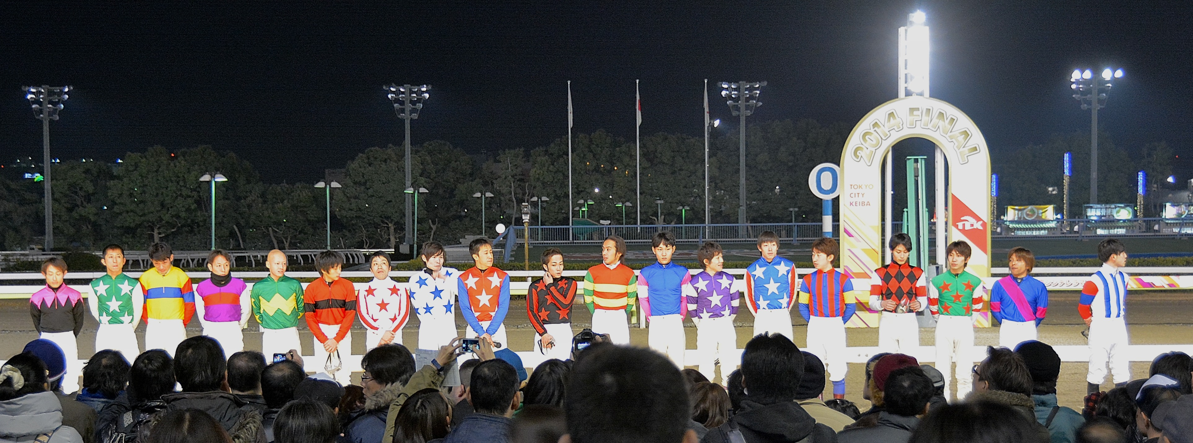 2014年12月30日に大井競馬場の第11競走終了後に、TCK所属騎手一同により、2014年の感謝を表す締め括りの挨拶が行われたところを、観客席から撮影したもの。【騎手説明：全19名】左から達城龍次、東原悠善、柏木健宏、早田秀治、高橋昭平、横川怜央、高野誠毅、早田功駿、吉井竜一、有年淳、本村直樹、遠藤健太、小林拓未、赤嶺亮、千田洋、上田健人、石川駿介、高野毅、安藤洋一（後ろを向いている騎手）。